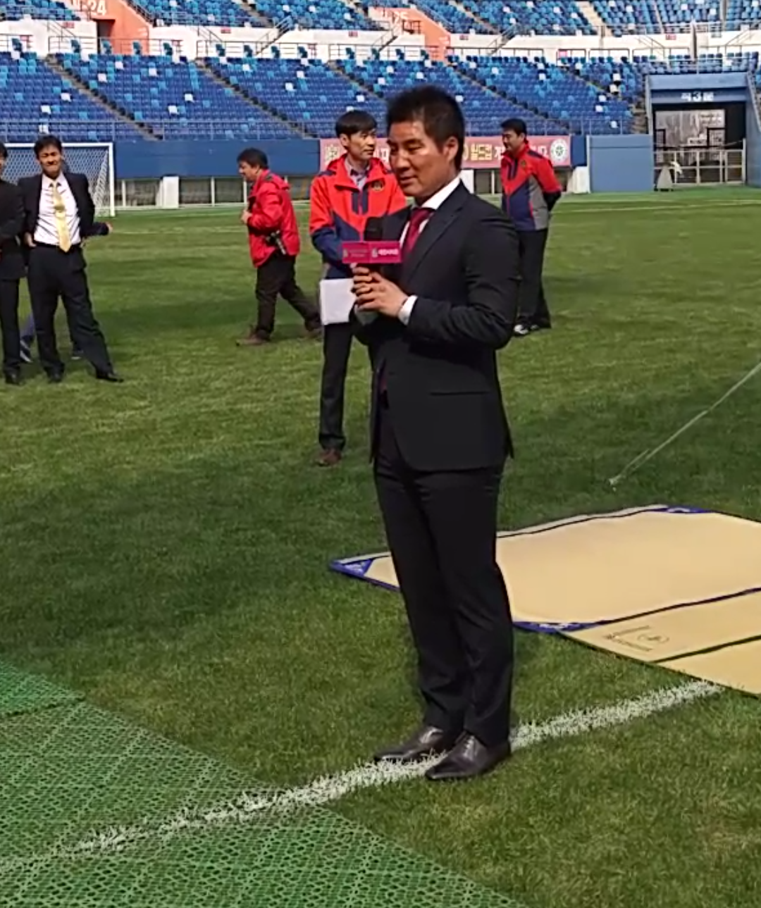 대전시티즌 감독 최문식